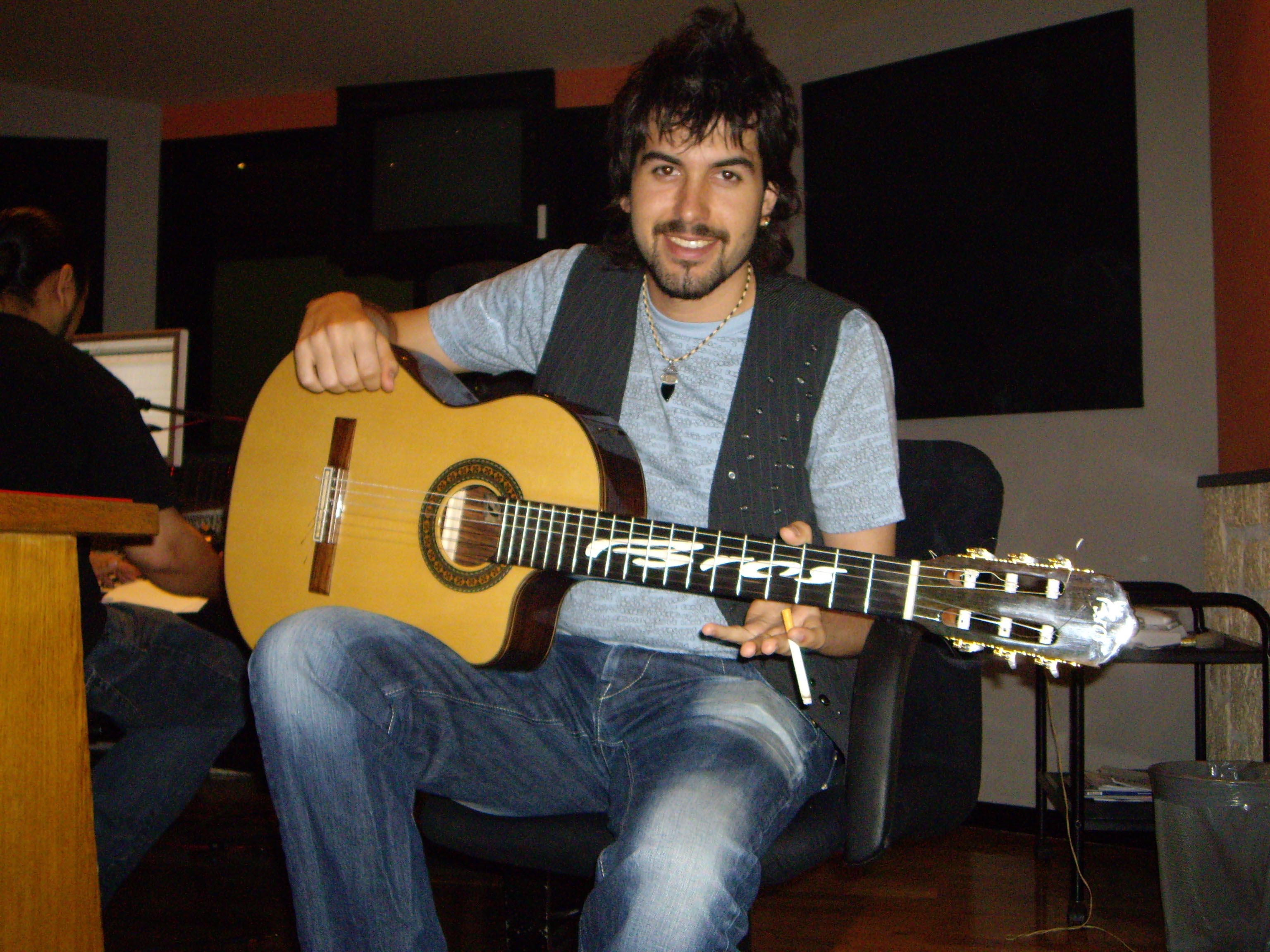 Esta foto la tengo de cuando grabé en el estudio.